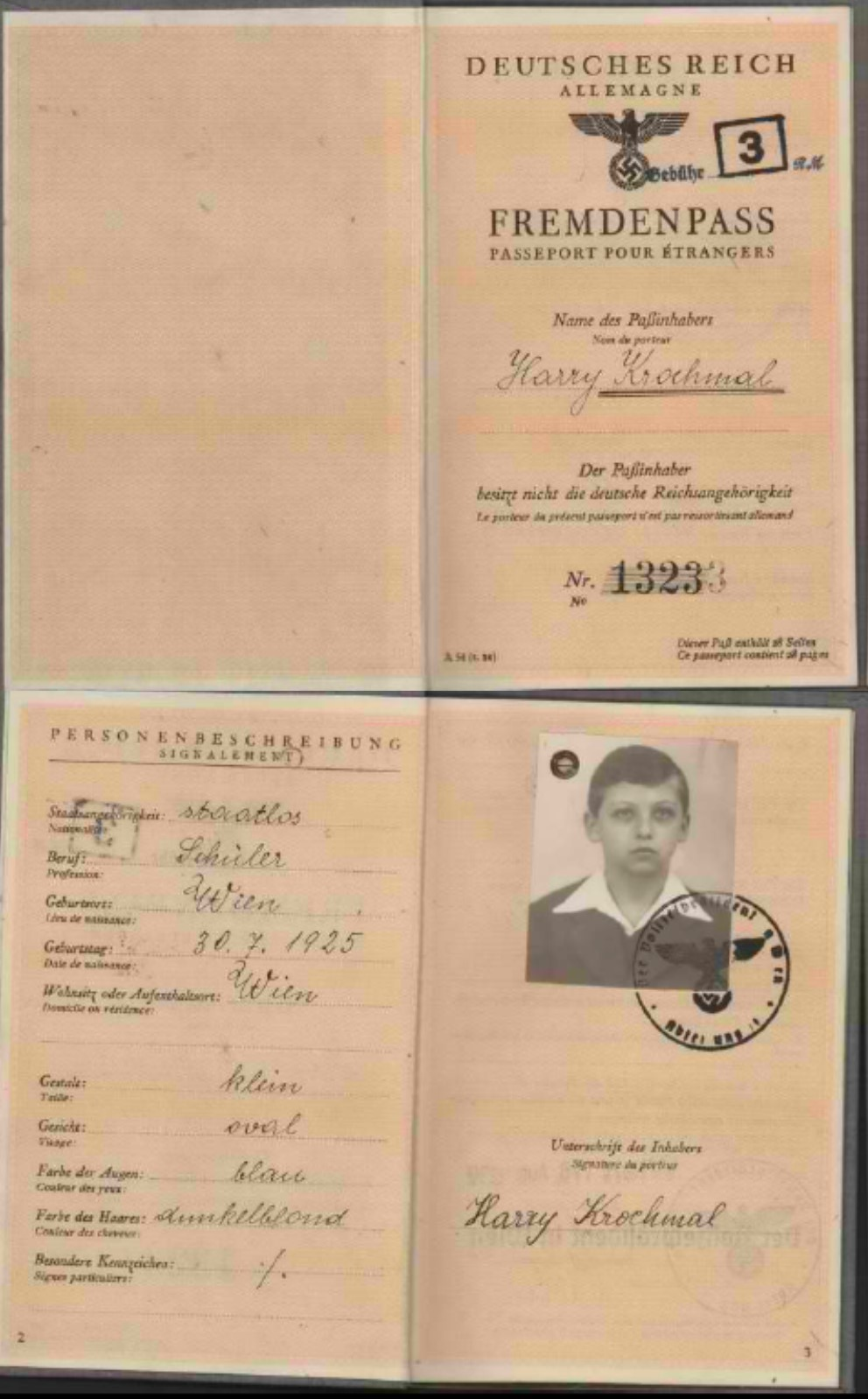 דרכון העלייה לישראל, 11/1939